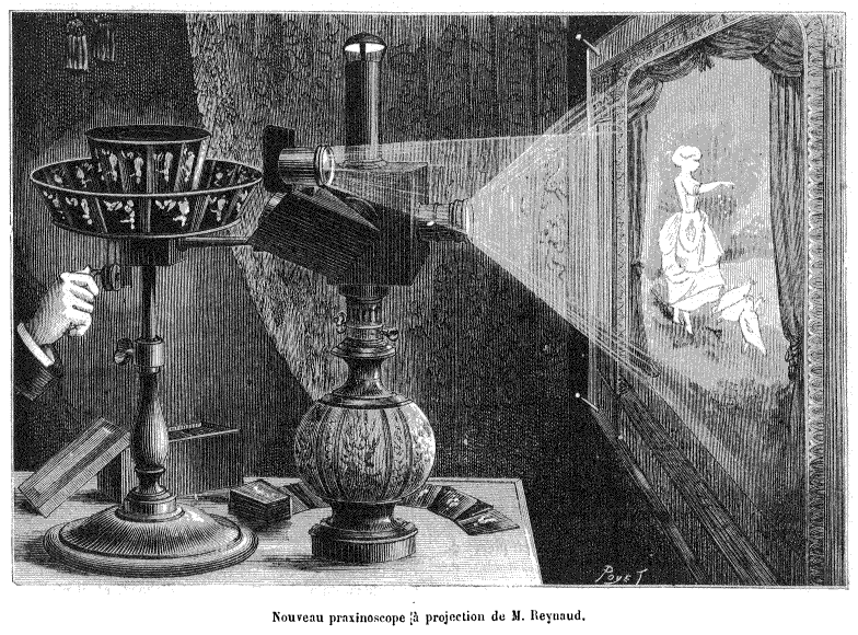 Le praxinoscope à projection d'Émile Reynaud pour La Nature, revue des sciences - 1882, n° 492, page 357.